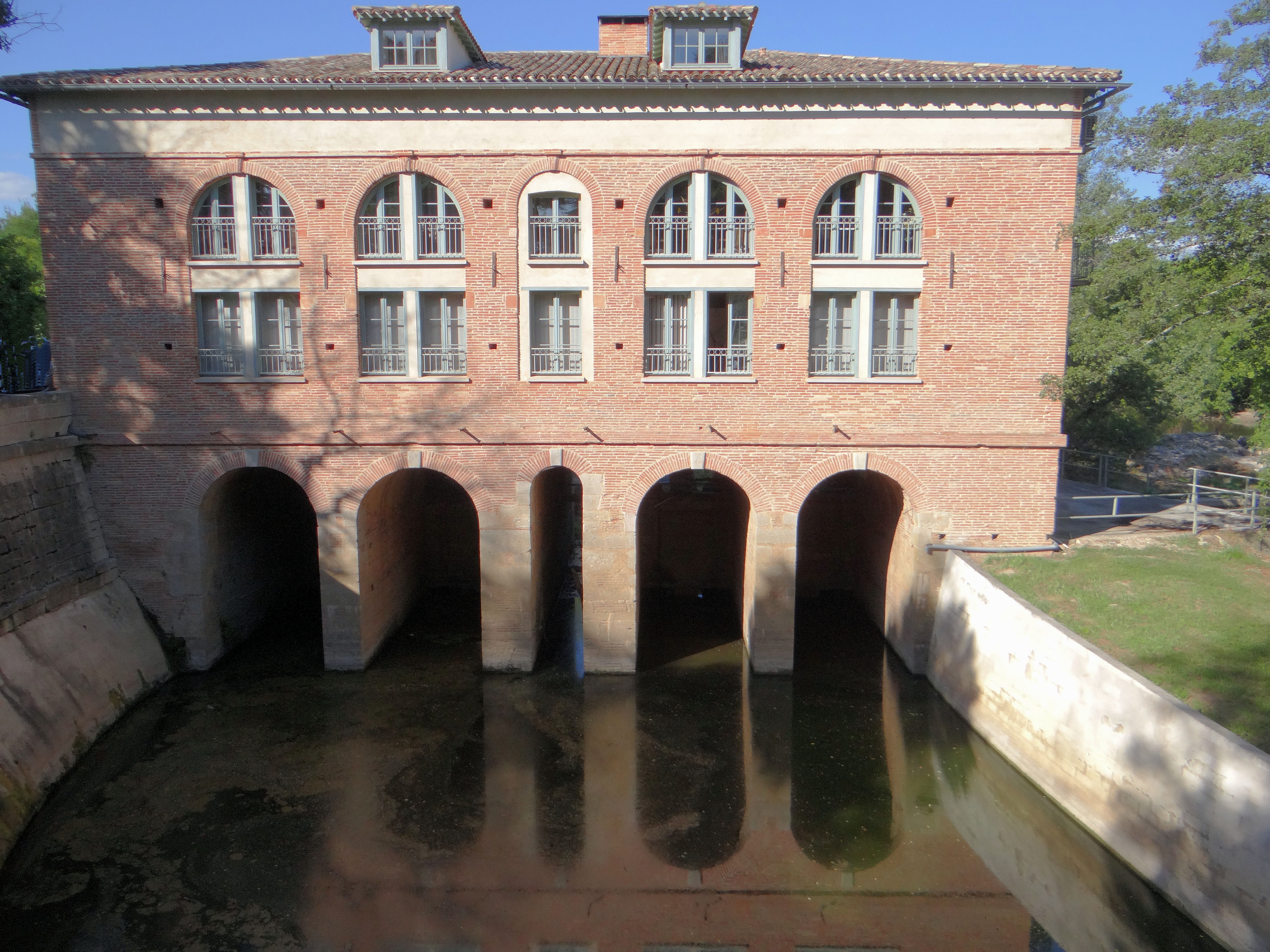 Cayrac - Moulin de Bellerive (Cayrac) - Façade côté restitution (ouest)